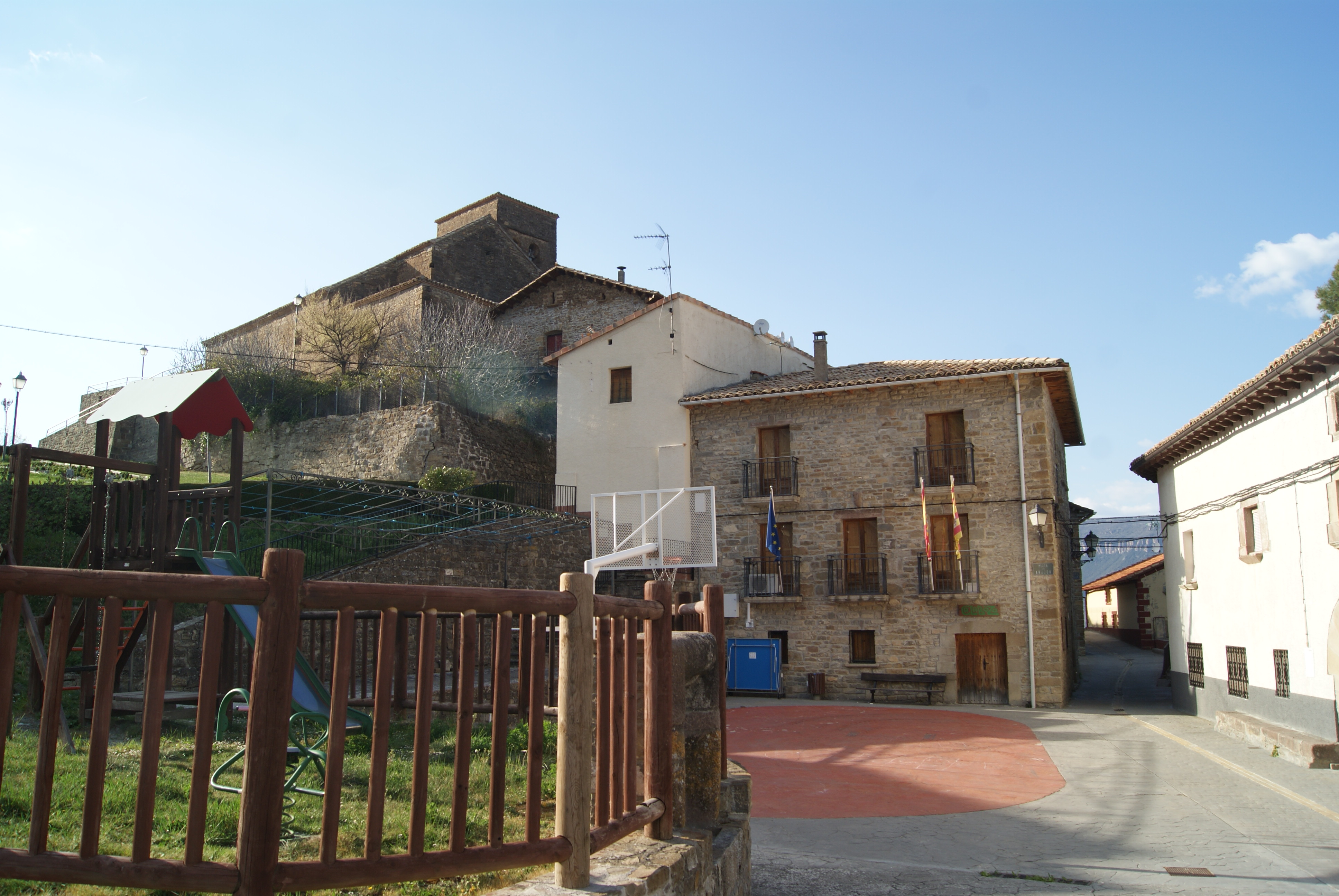 Mianos (Zaragoza)